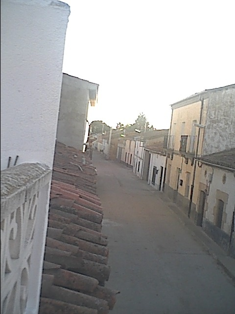 Calle de Palencia de Negrilla (Salamanca, Castilla y León). © (--Hari Seldon 01:33 19 abr, 2005 (CEST)).